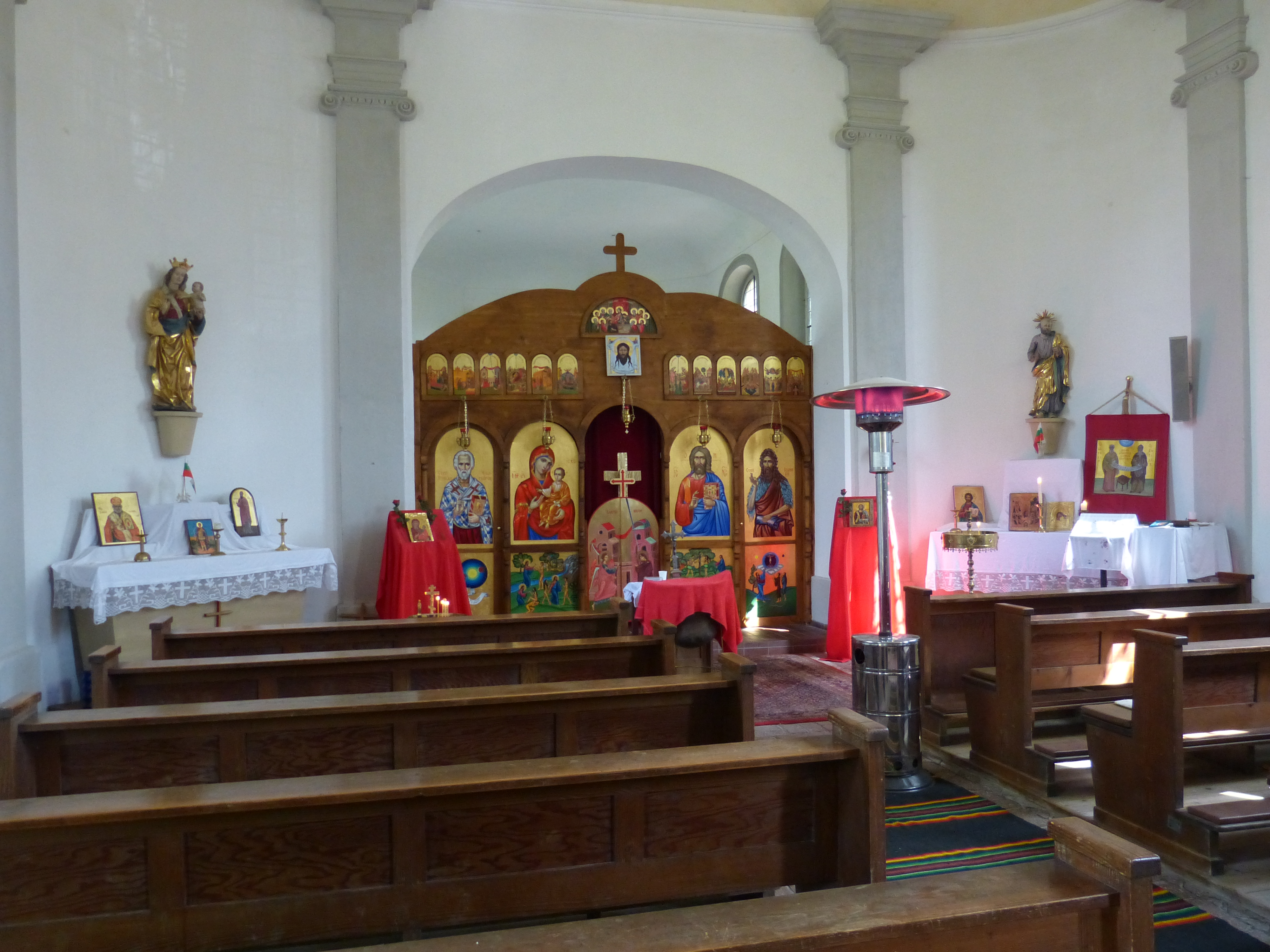 Innenraum mit geschmücktem Altar des Peterskirchleins in Regensburg.